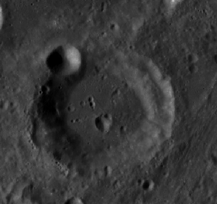 Cráter lunar Holden. (Imagen LRO)